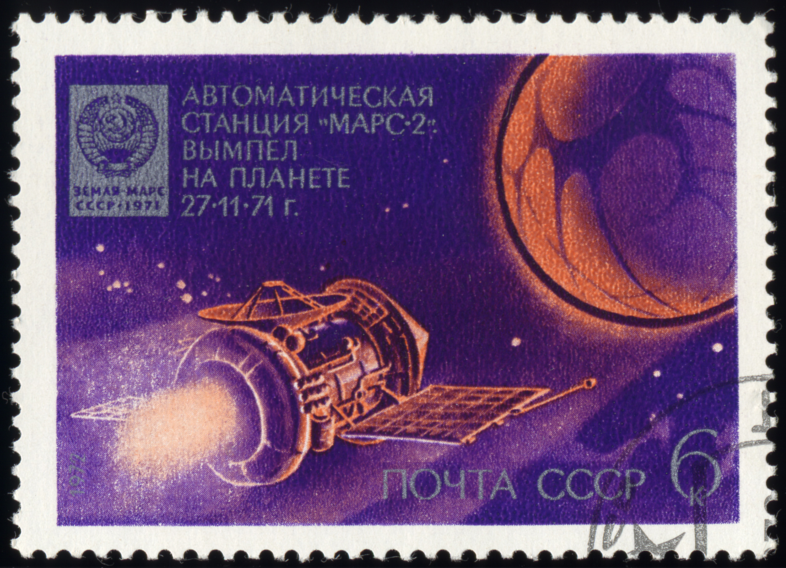 Почтовая марка СССР. 1971. Марс-2